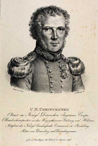 Nicolaus "Claus" Heinrich Christensen (1768-1841), Danish Major General. Lithograph.